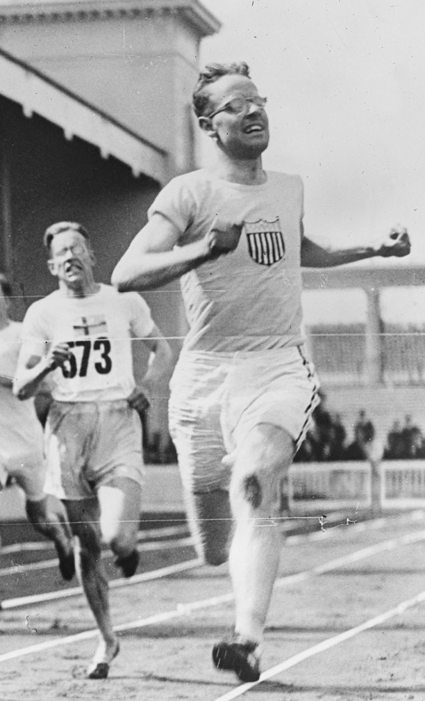 Frank Loomis gagnant le 400 m [haies, demi-finale, Jeux olympiques d'Anvers, 15/8/20]